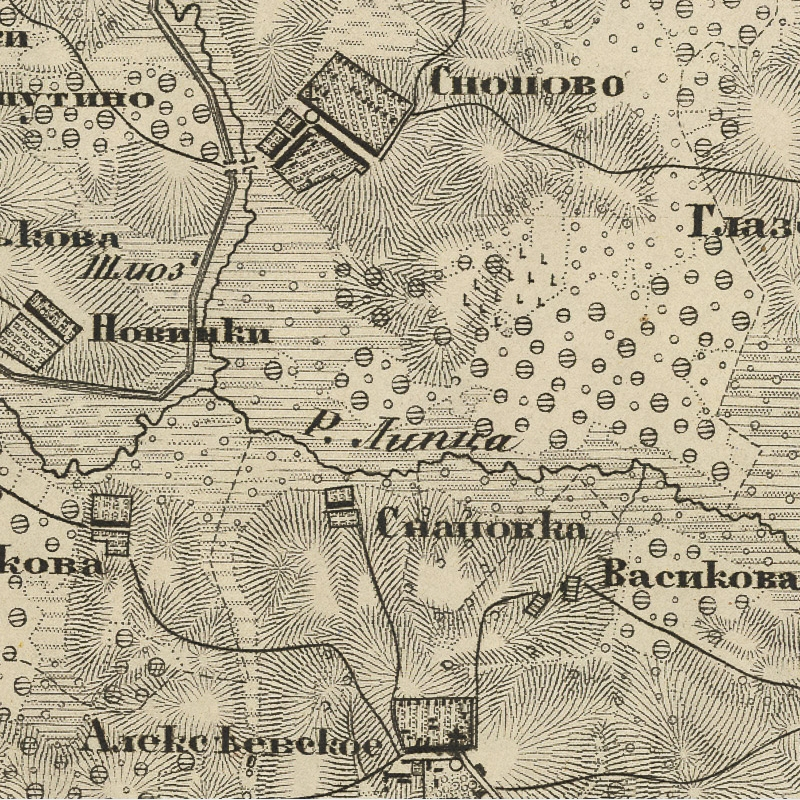 Река Лопца (Липца) Солнечногорского района Московской области на карте Московской губернии Ф. Ф. Шуберта